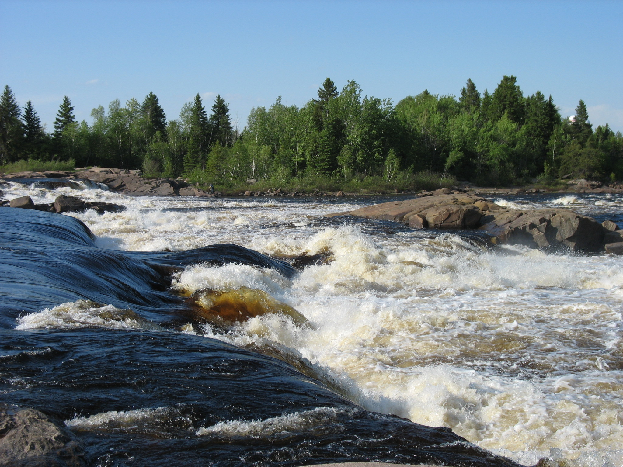 Les chutes à Michel sur la rivière Ashuapmushuan, Saint-Félicien, Québec, Canada